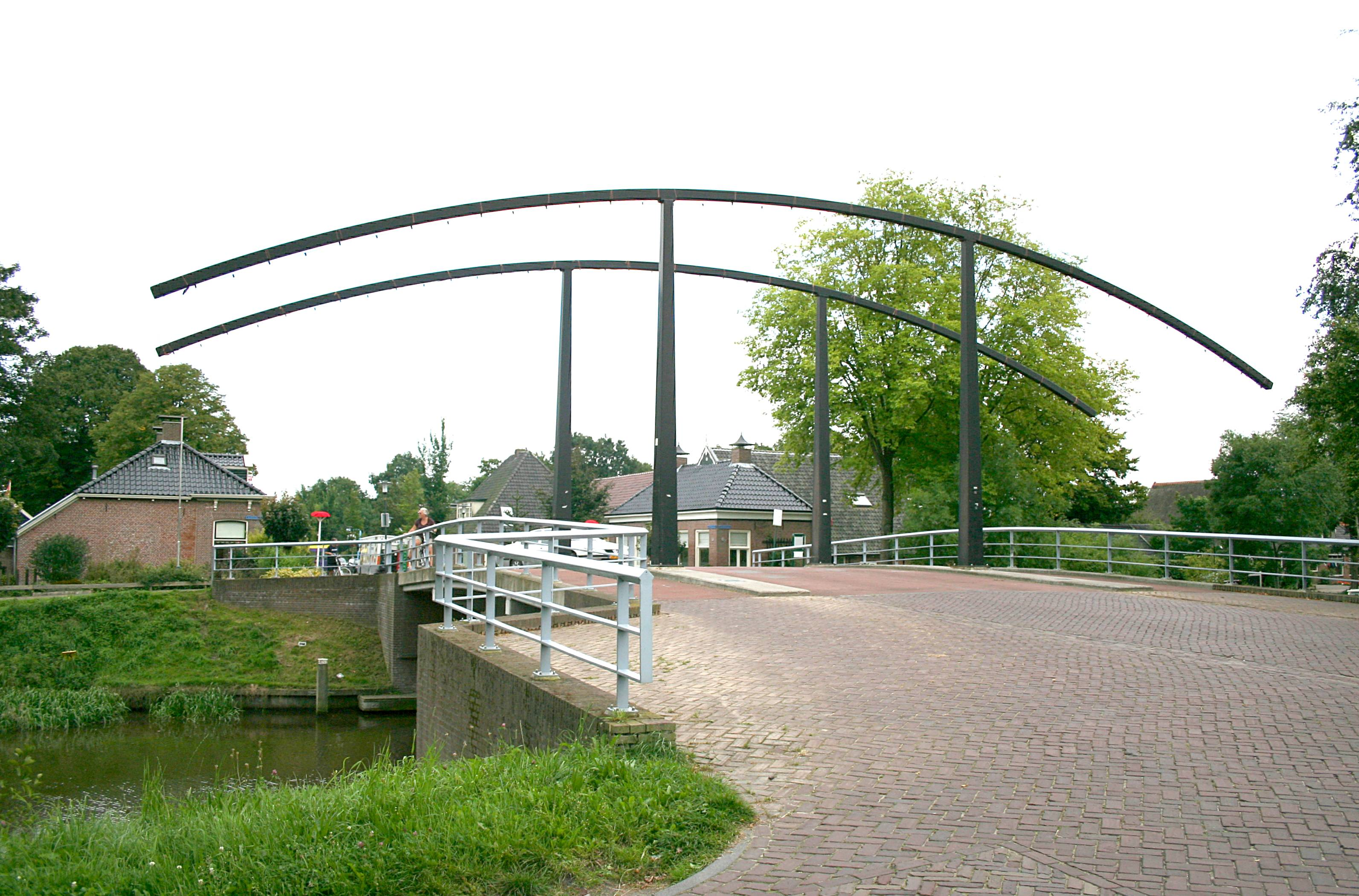 Ids Willemsma,1990